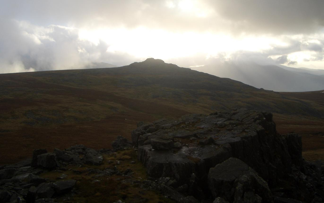 Bera Bach